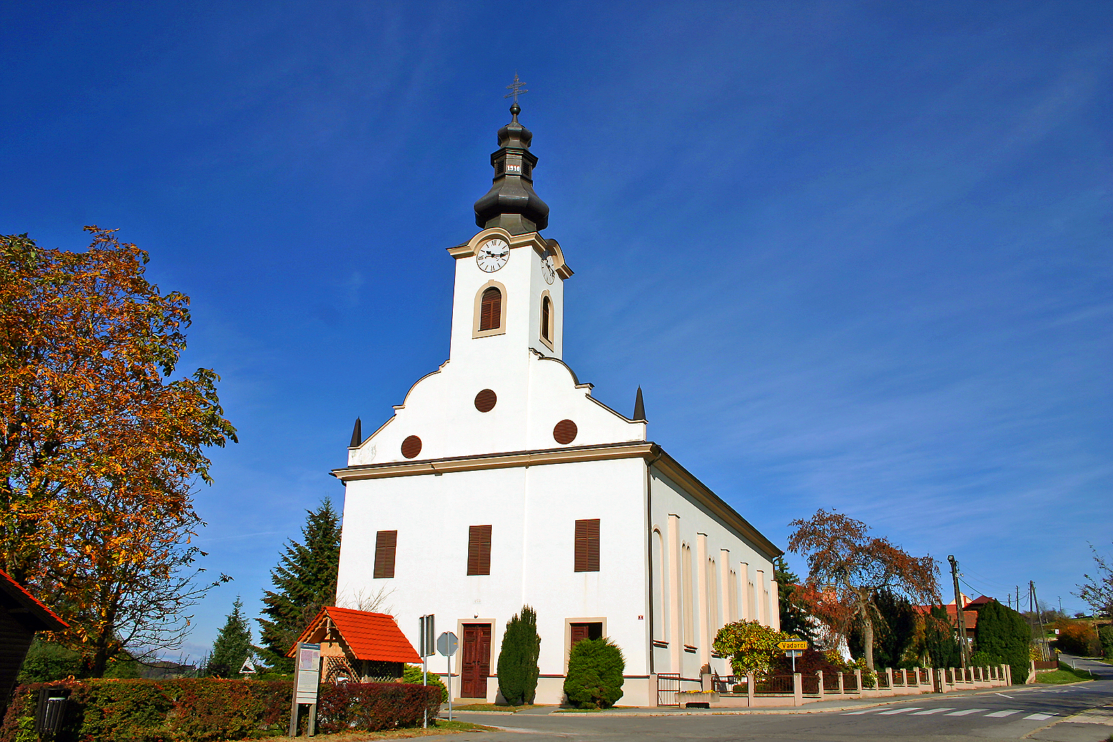 Evangeličanska cerkev, Bodonci. Evangelical church, Bodonci. Work of Daniel Placott (from Budapest). Evangelische Kirche, Bodonci. Delo arhitekta Daniela Placotta (iz Budimpešte).